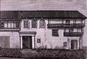 Casa de la Real Audiencia en la plaza mayor de Santafé de Bogotá. Grabado de Eustacio Barreto sobre dibujo de Ramón Torres Méndez. "Papel Periódico Ilustrado", junio 15 de 1885. Biblioteca Nacional de Colombia, Bogotá.